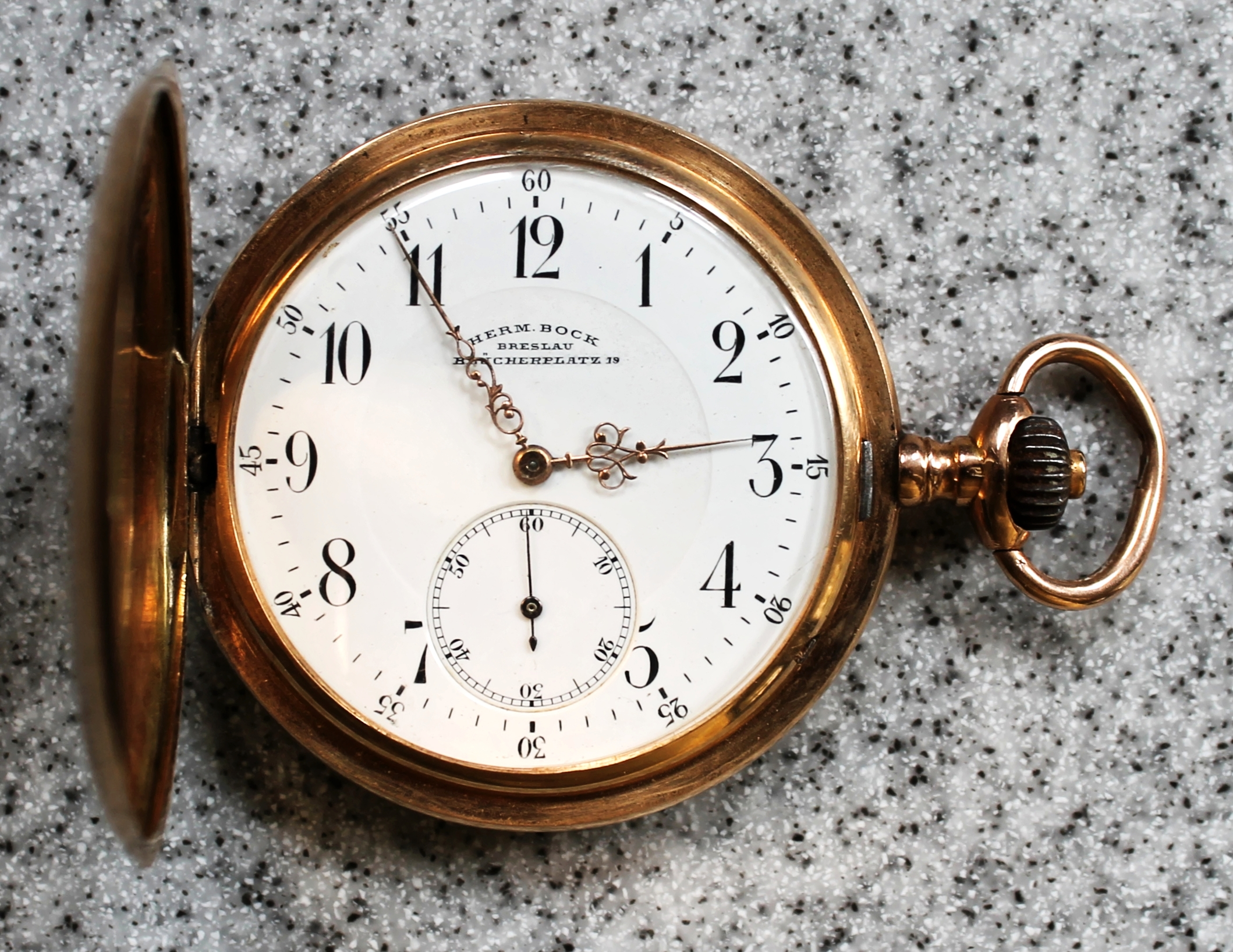 Longines-Taschenuhr von 1909